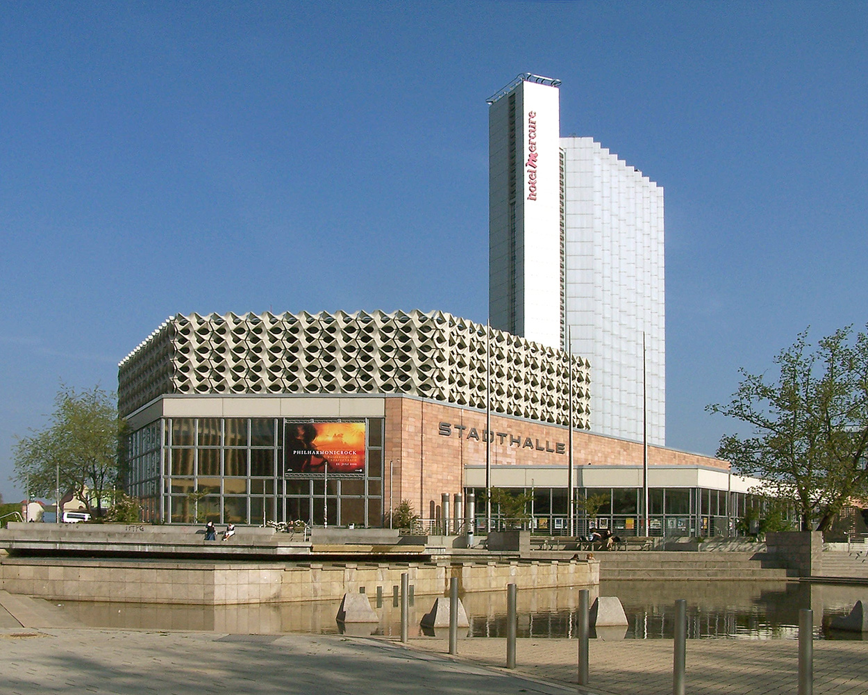 Die Stadthalle im Zentrum von Chemnitz. Dahinter das Mercure-Hotel